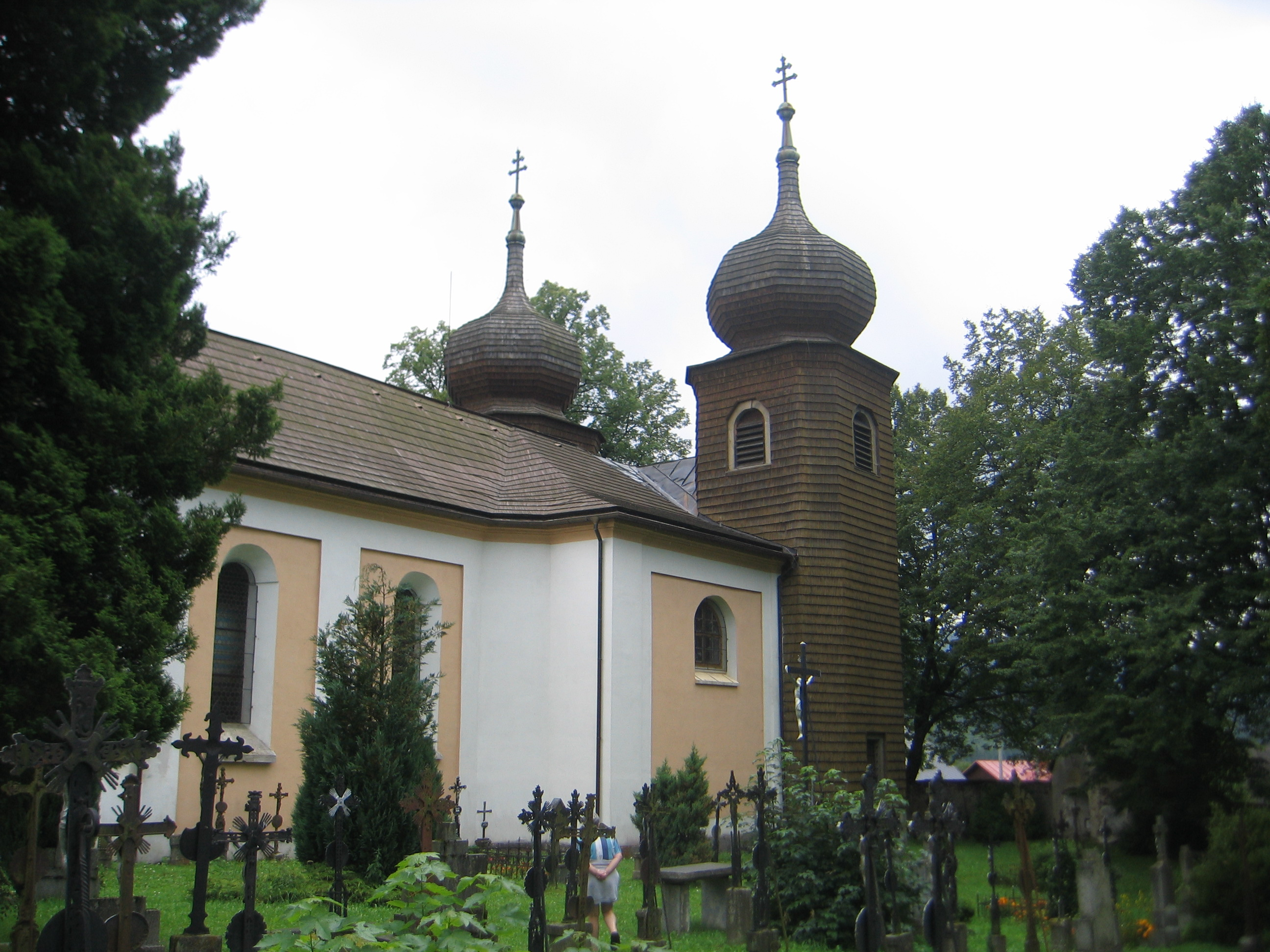 Kostel sv. Anny (Javorná), Javorná.